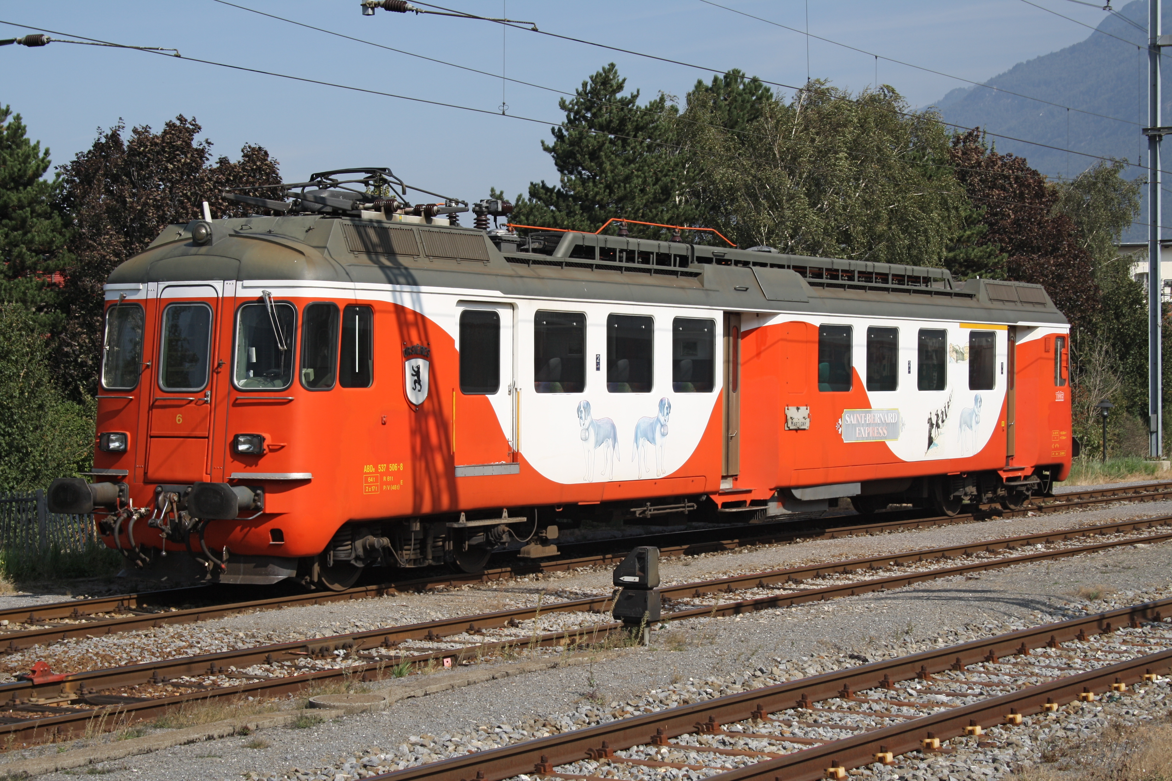 Triebwagen 6 der MO in Martigny